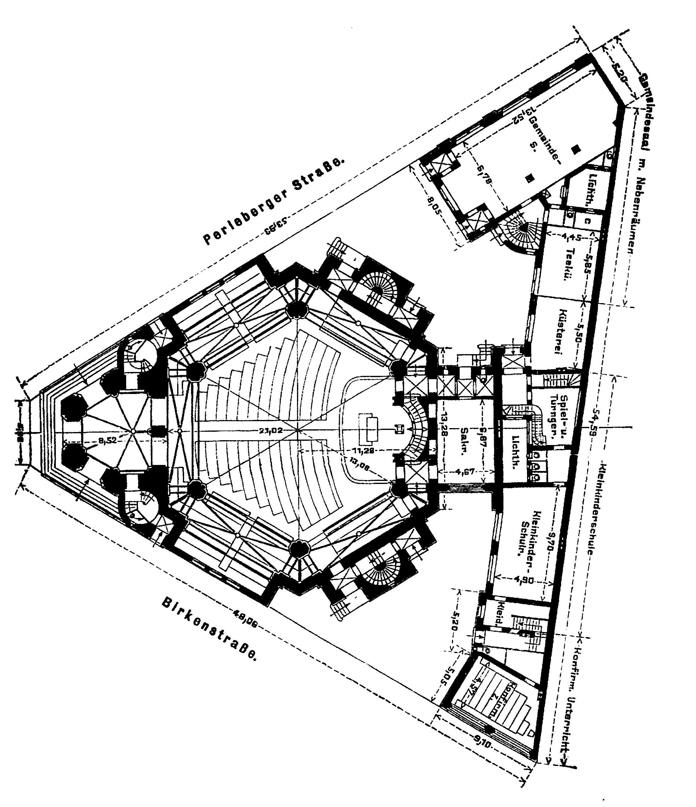 Griundriss der Heilige-Geist-Kirche in Berlin-Moabit, Bauplan